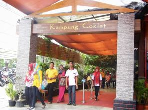 Pintu Masuk Wisata Edukasi Kampung Coklat